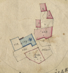 Els Banys d'Arles en el Cadastre napoleònic del 1812 (Arxius Departamentals dels Pirineus Orientals)